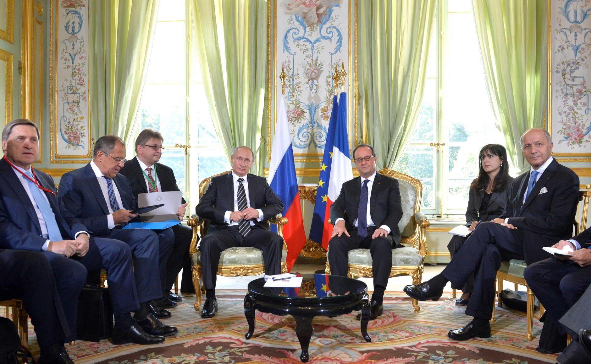 Встреча Президента России Владимира Путина с Президентом Франции Франсуа Олландом